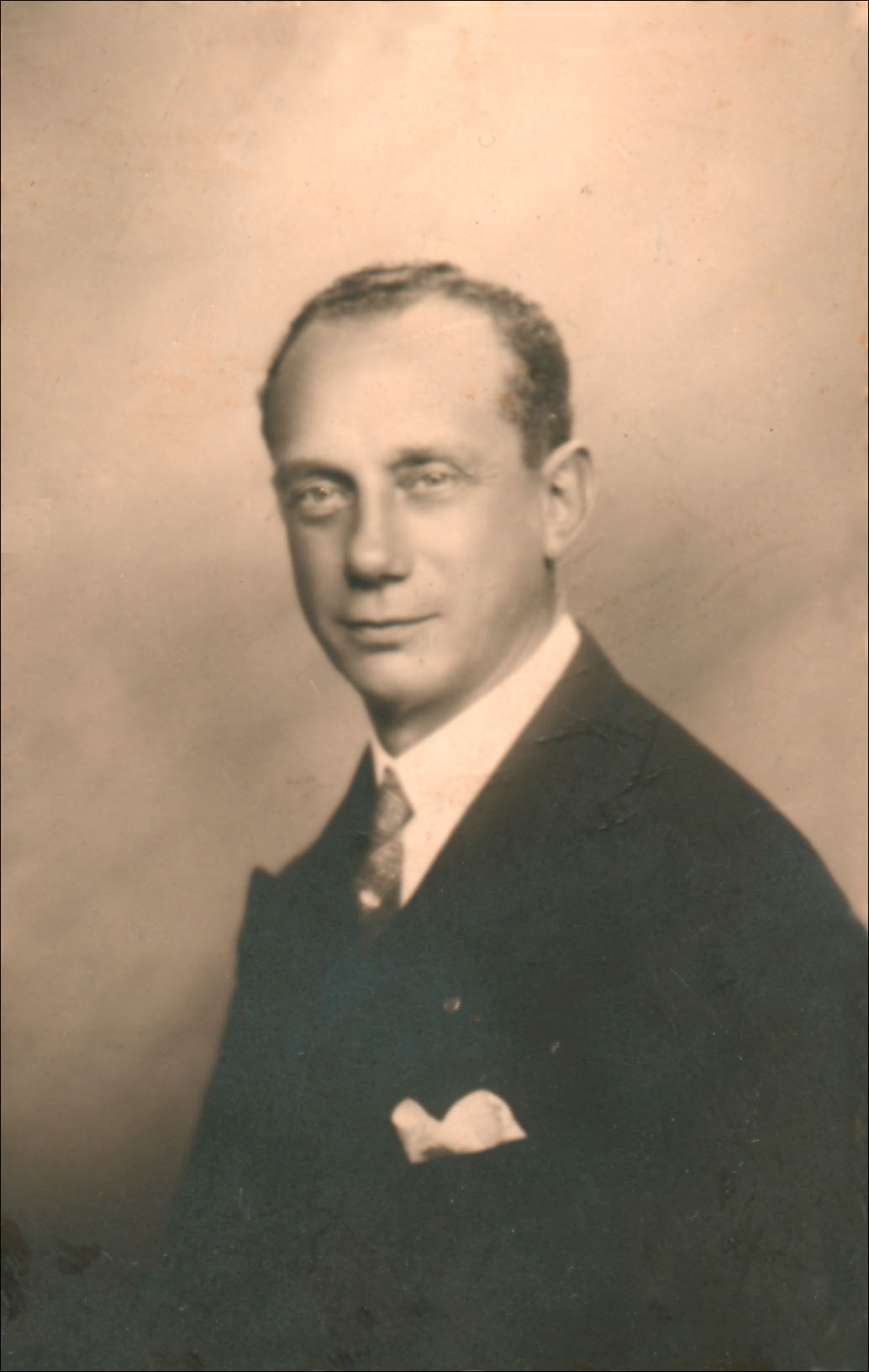 Oscar Bossaert jeune